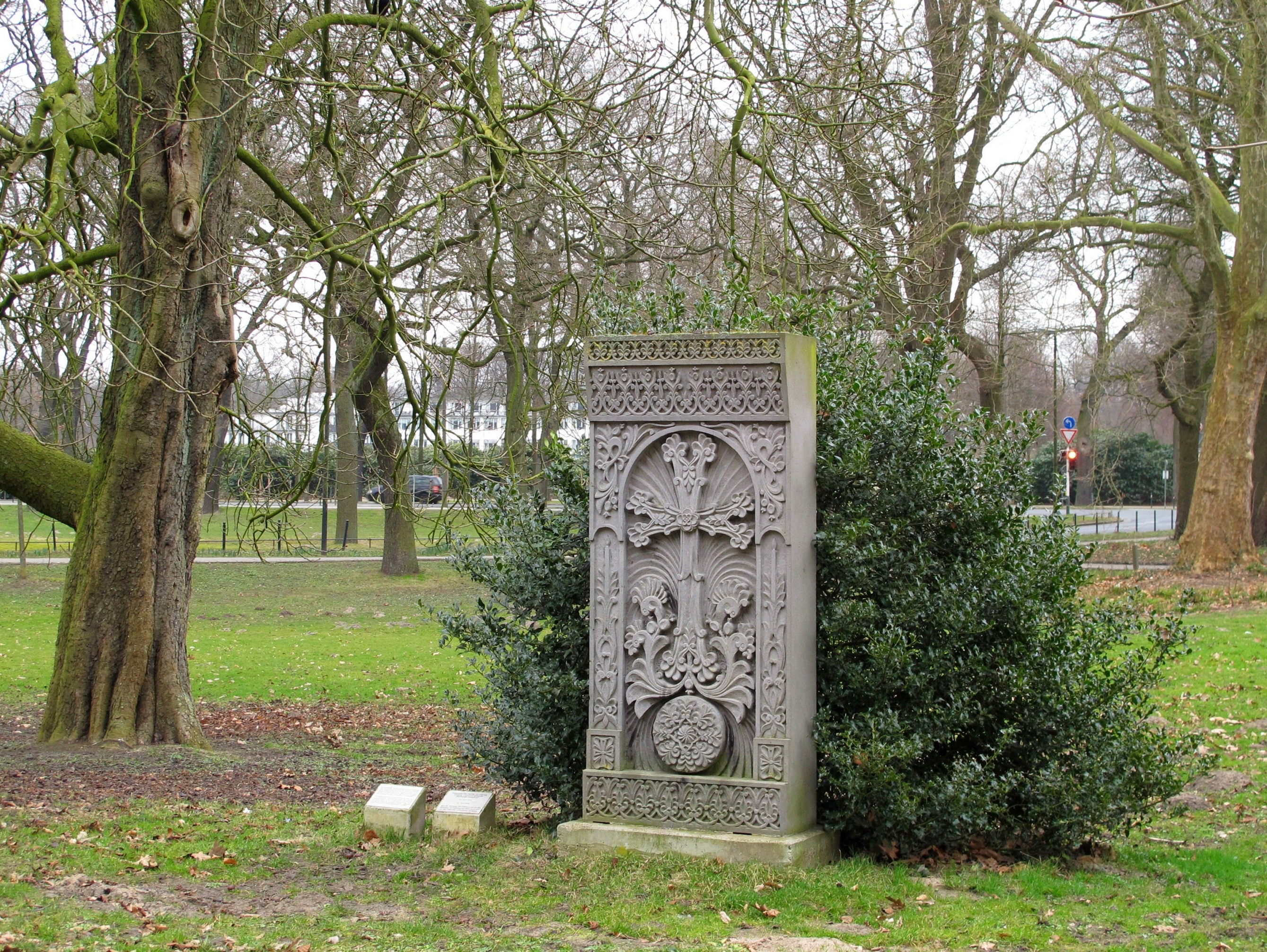 Khatchkar-Mahnmal. Aufgestellt 2005 zum Gedenken an den Völkermord an den Armeniern während des Ersten Weltkrieges. Höhe: ca. 2 m. Aufstellungsort: Bremen-Schwachhausen, Nelson-Mandela-Park.